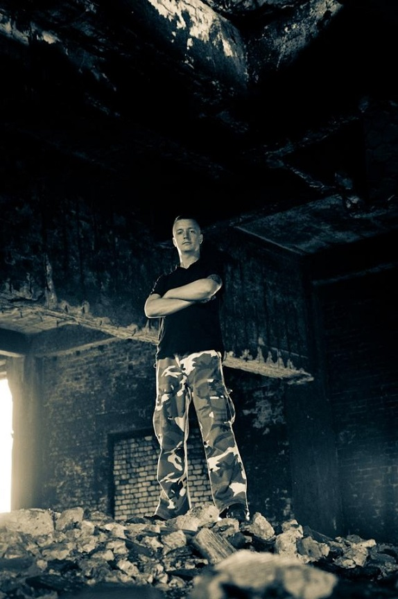 Grzegorz , Igor Osoba